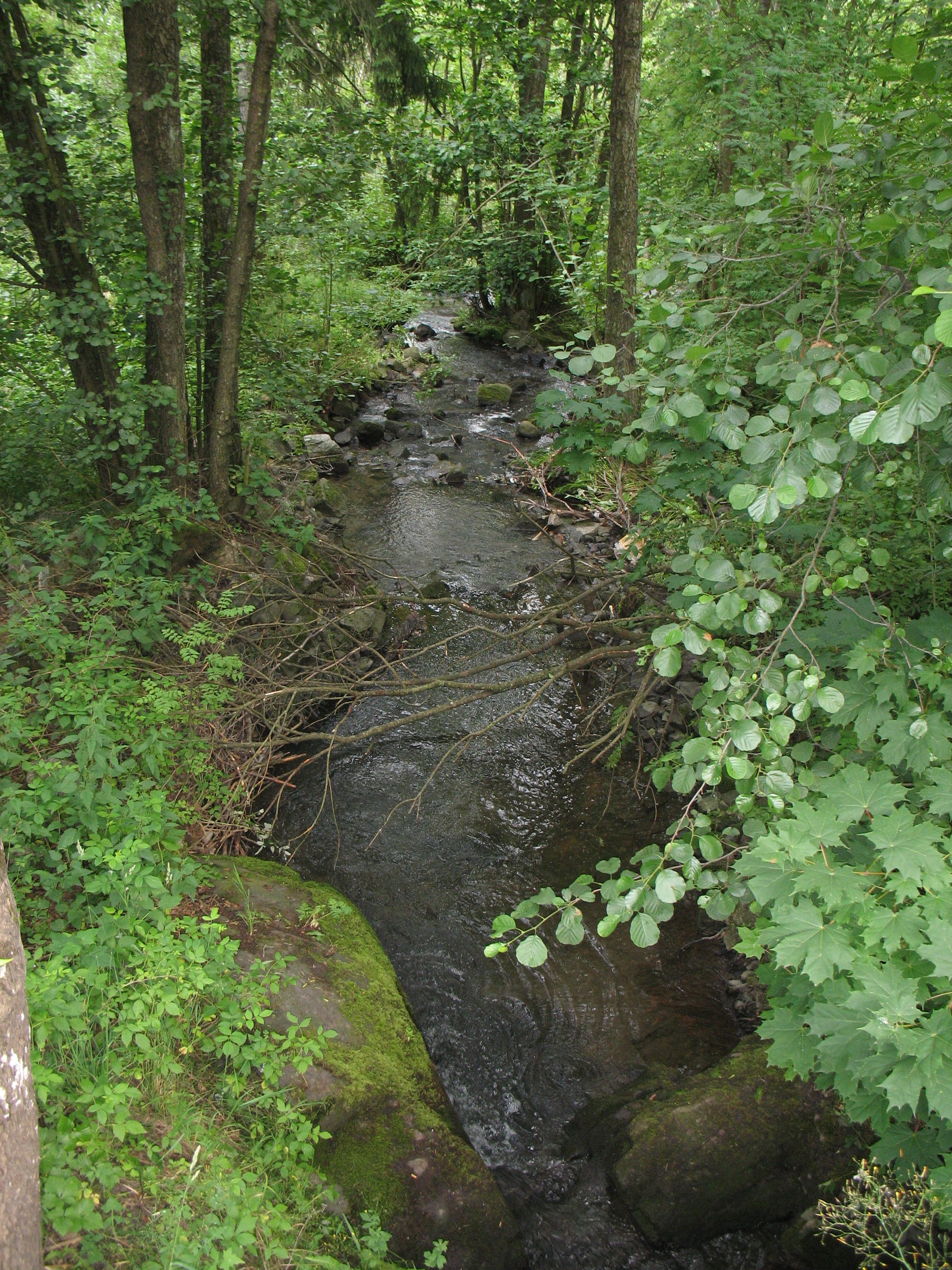 Bølerbekken, tatt fra Eterveien like nedenfor Bøler kirke.